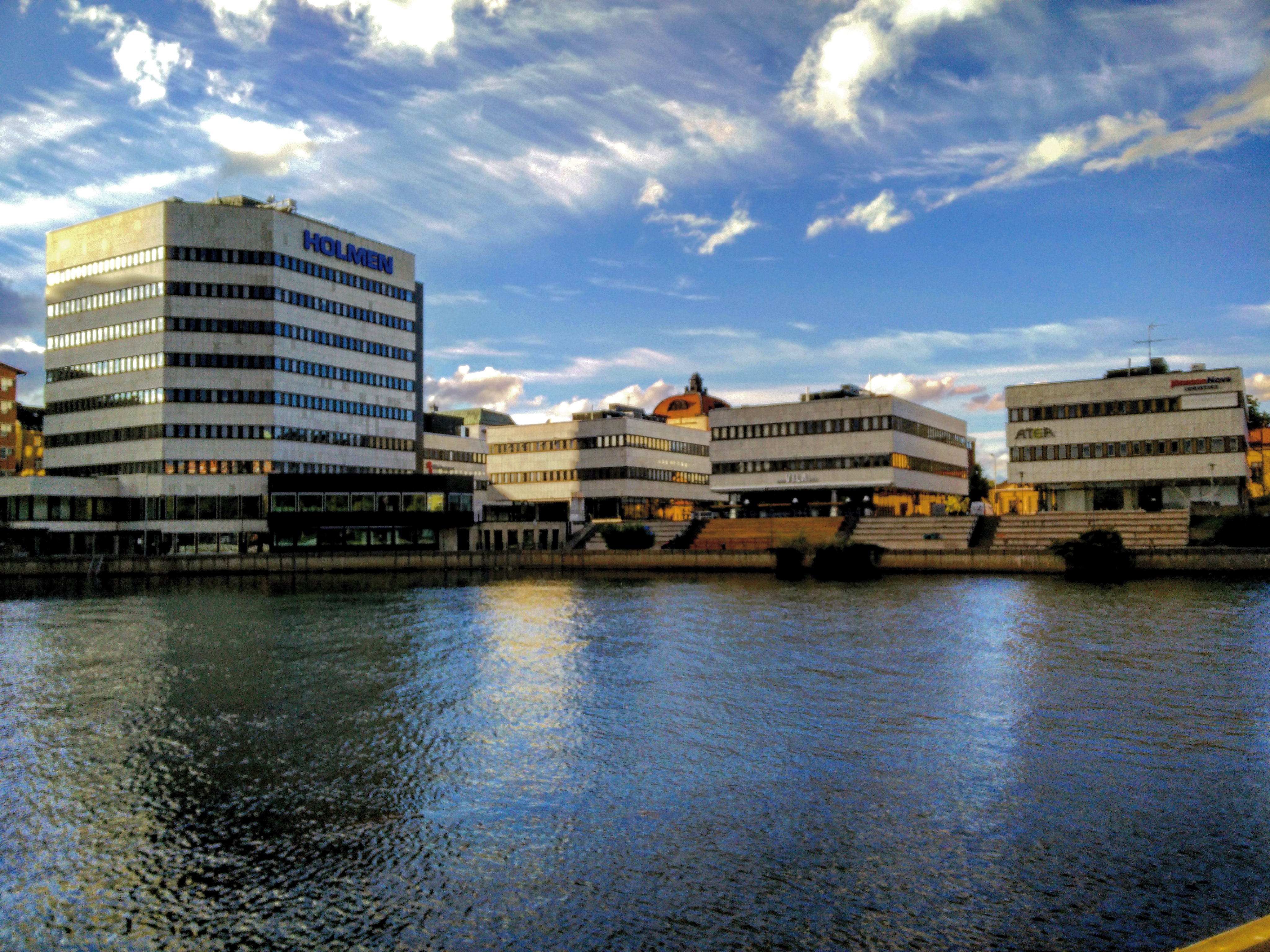 Byggnaderna mellan Bråddgatan/Vattengränden och Strömmen i Norrköping.